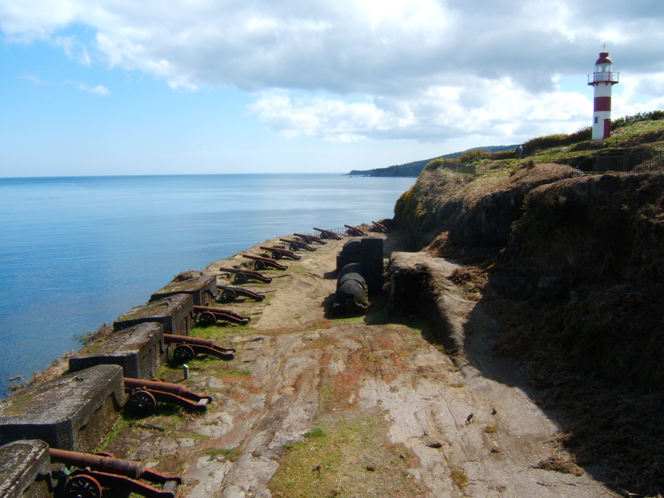 con faro This is a photo of a national monument in Chile: 170